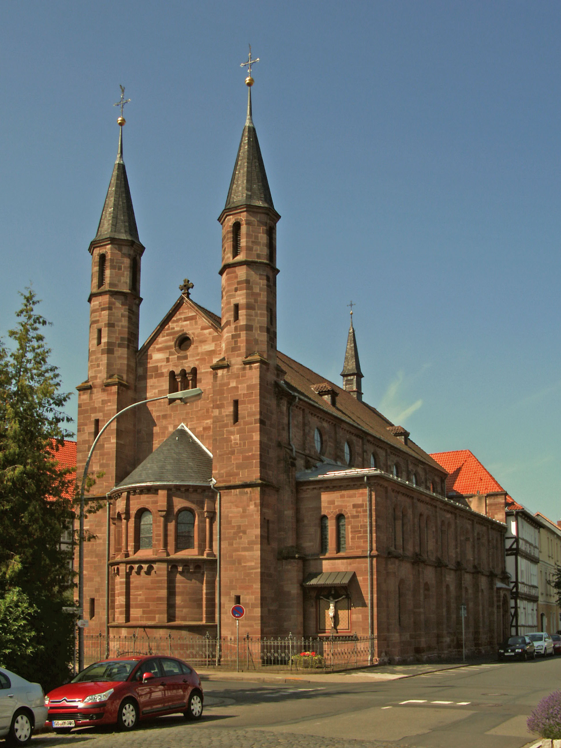 Kirche des Ursulinen-Klosters in Duderstadt, Landkreis Göttingen